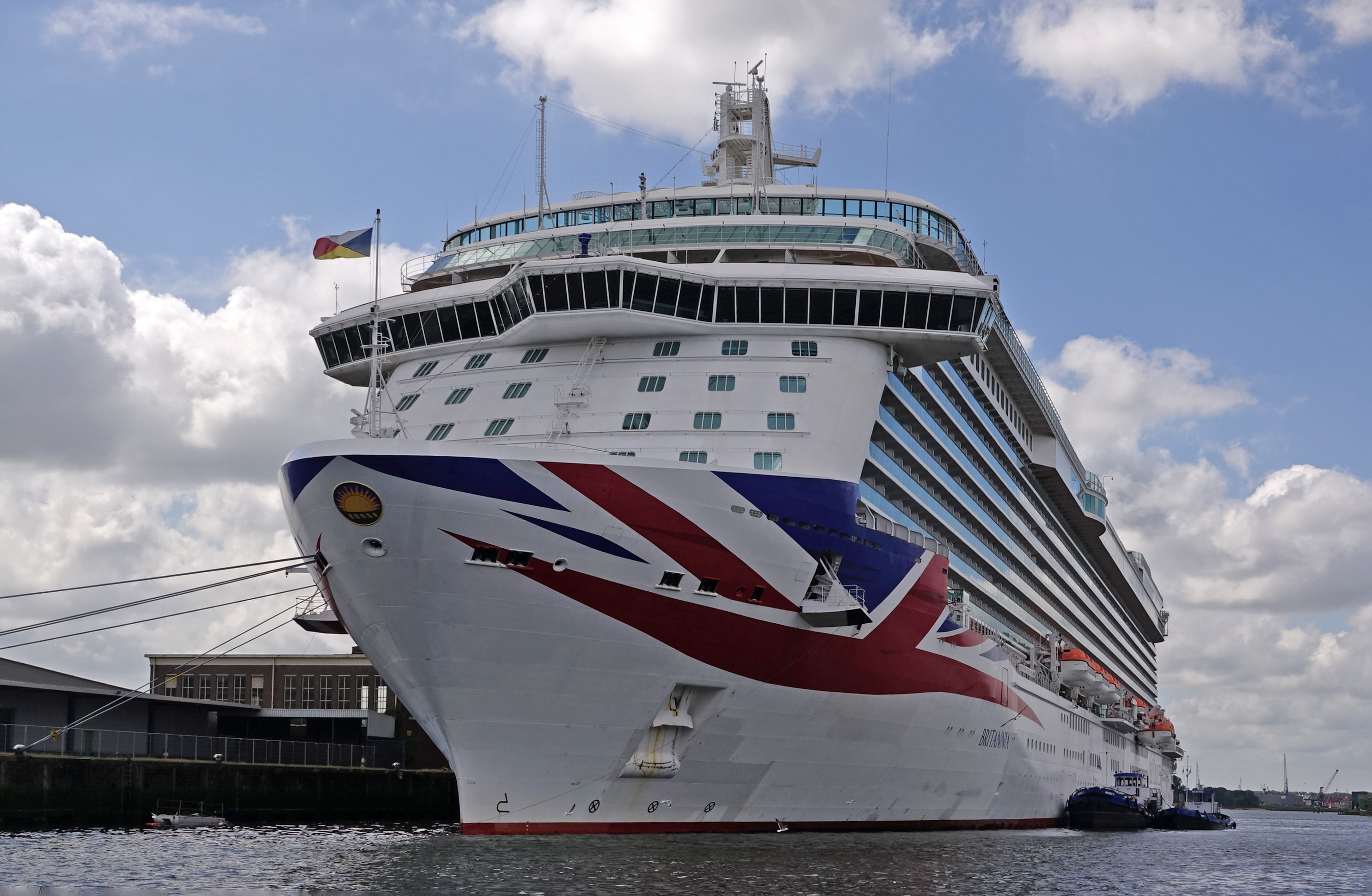 Merwehaven Schiedam 6-6-2019